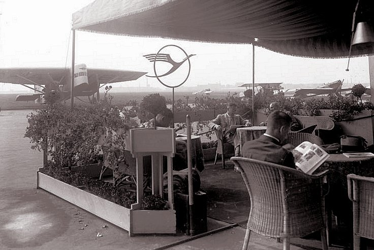 Die Flugsaison hat wieder begonnen! Wärtende Flugpassagiere auf dem Centralflughafen in Berlin-Tempelhof. Im Hintergrund die grossen Verkehrsmaschinen.